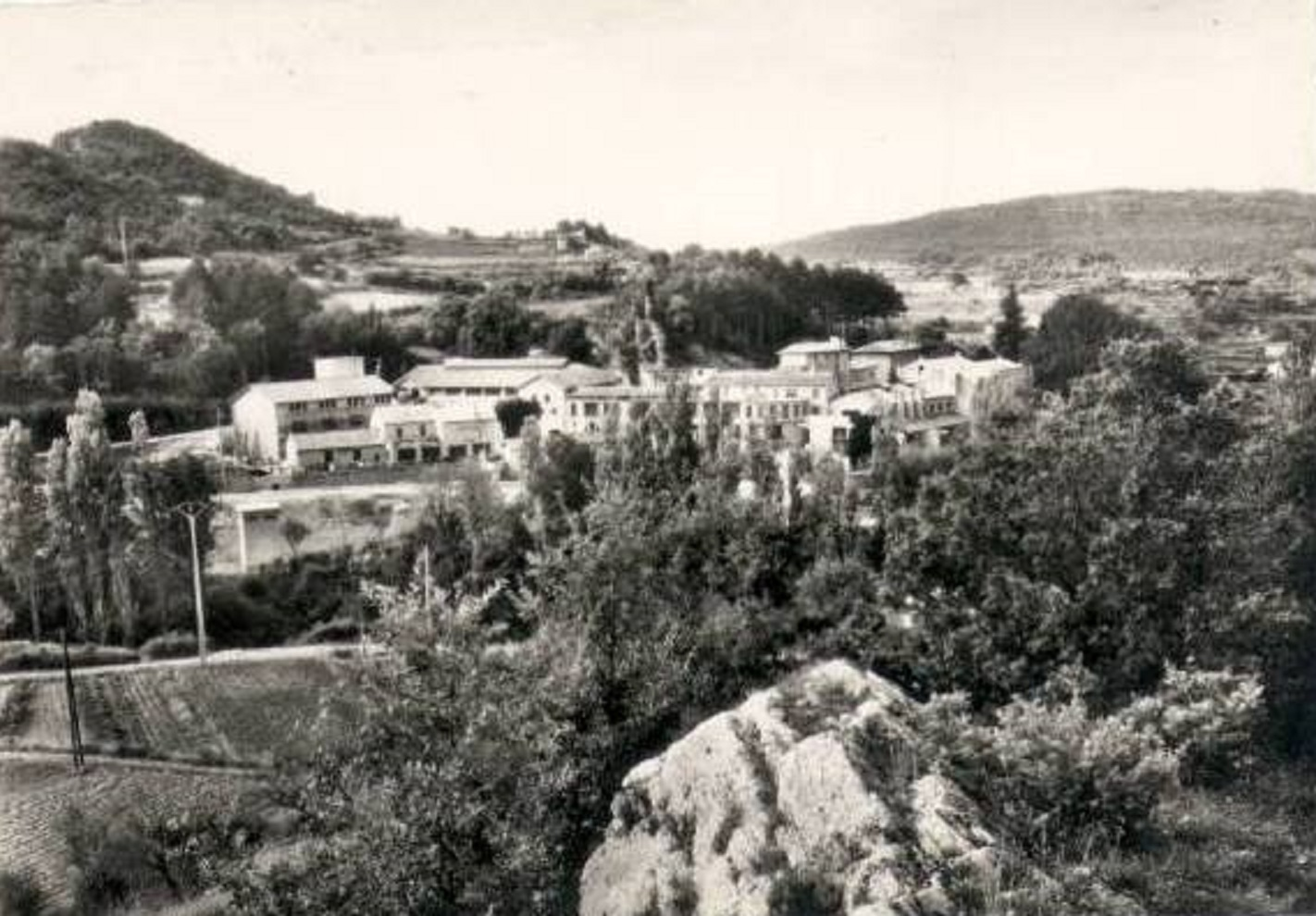 Les papeteries de Malaucène